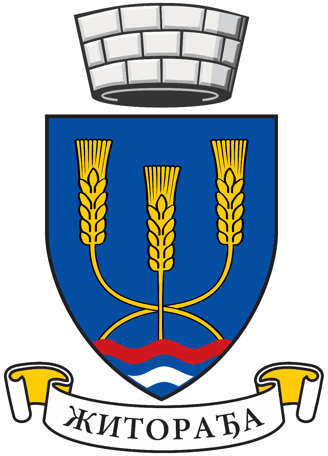 Средњи грб општине Житорађа је основни грб допуњен параферналиjама тj. додатним садржаjима изван штита. Изнад штита се налази сребрна бедемска круна без видљивих мерлона (зуба) који представљају територијалну ознаку која хералдички говори да се ради о територији са око 20.000 становника. Испод штита је постављена лента (трака) на којој је исписан назив Општине. Она није обавезна, али појачава визуелни осећај целине. Графичко решење знамења Општине Житорађа урадио је Љубиша Стевановић из Житорађе, радник Општинске управе општине Житорађа, уз стручну помоћ Ивана Сарајчића. Грб је званично усвојен на седници Скупштине општине Житорађа, дана 15.10.2010. године. Употреба је регулисана Одлуком о употреби имена, грба и заставе општине Житорађа.